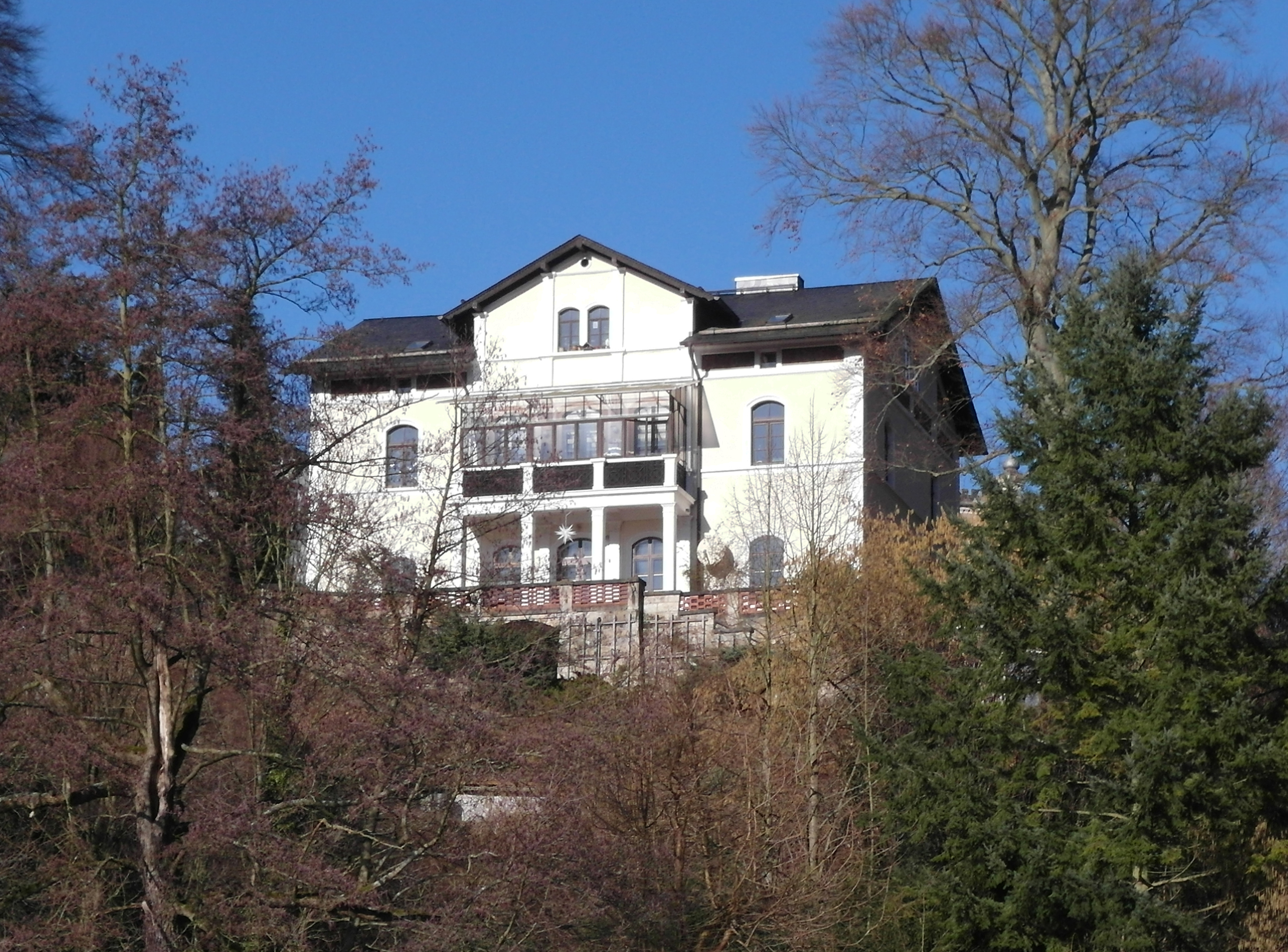 02.02.2018 01737 Tharandt: Direkt neben der Burgruine steht die 1851 für Julius Adolph Stöckhardt gebaute klassizistische Villa, Heinrich-Cotta-Str. 19 (GMP: 50.981540,13.582143). Sicht von Süden. [SAM3721.JPG]20180202225DR.JPG(c)Blobelt